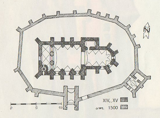 Planul fortificatiei din Velţ.